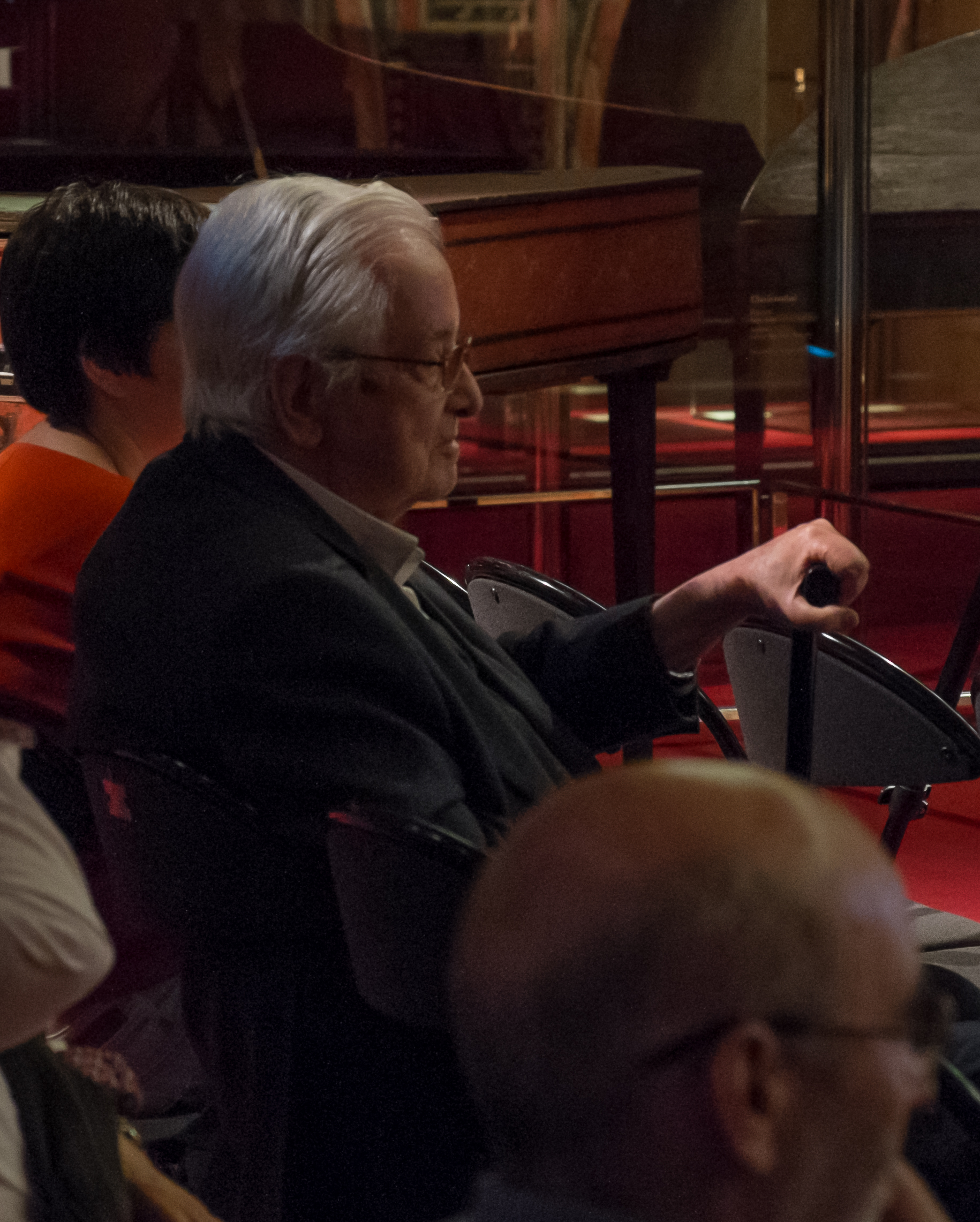 Retrat de Lluís Serrahima